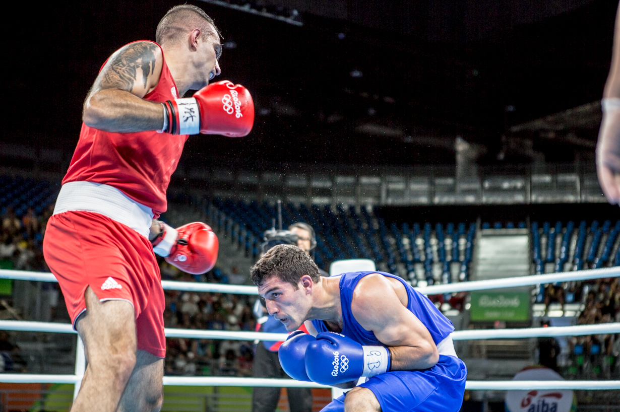 Day 3 Hungary (Zoltán Harcsa) vs Turkmenistan (Arslanbek Achilov)